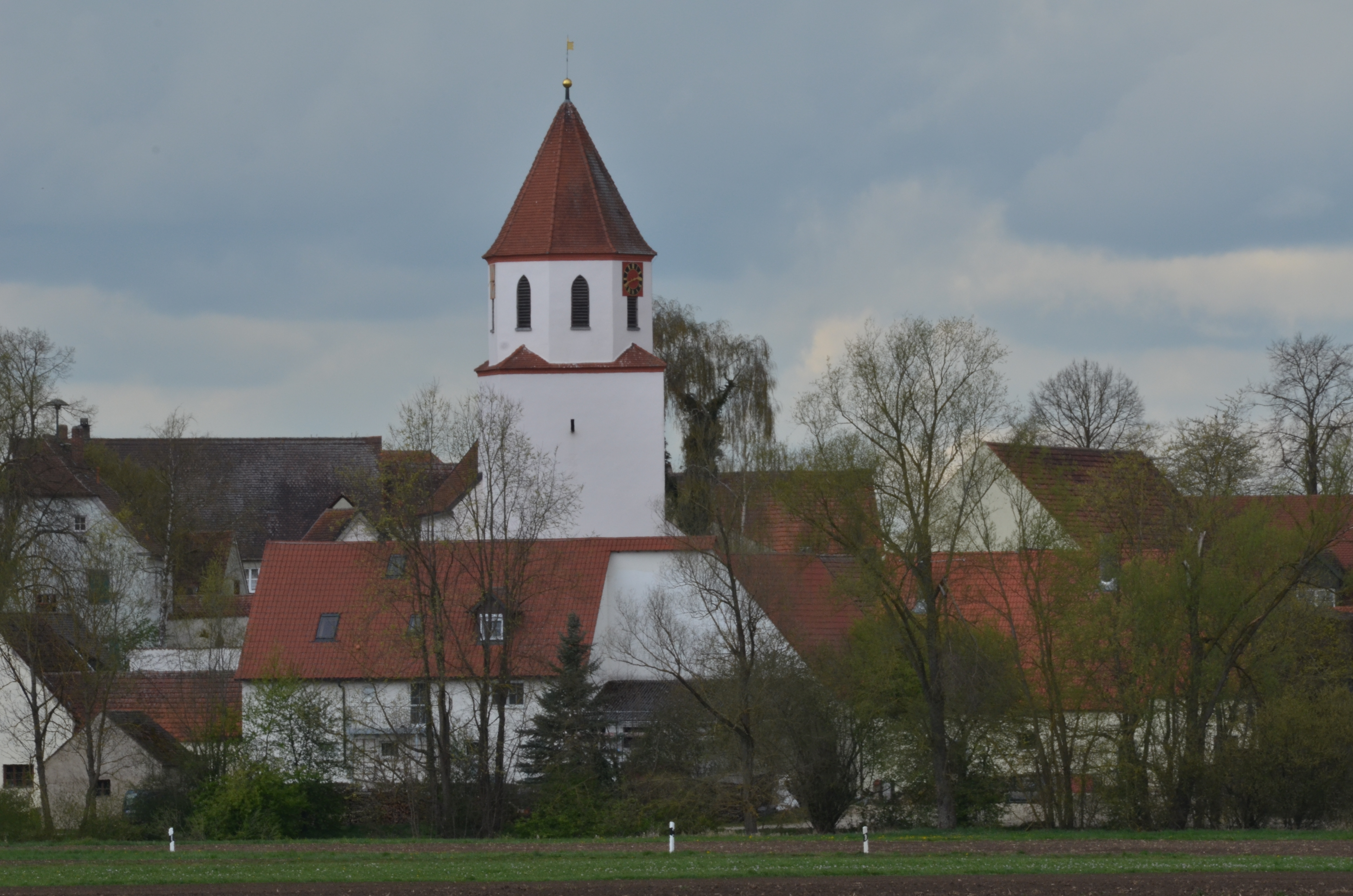 evang.-luth. Kirche St. Maria in Ostheim Wörnitzostheim mit der evang.-luth. Kirche St. Maria und Anna